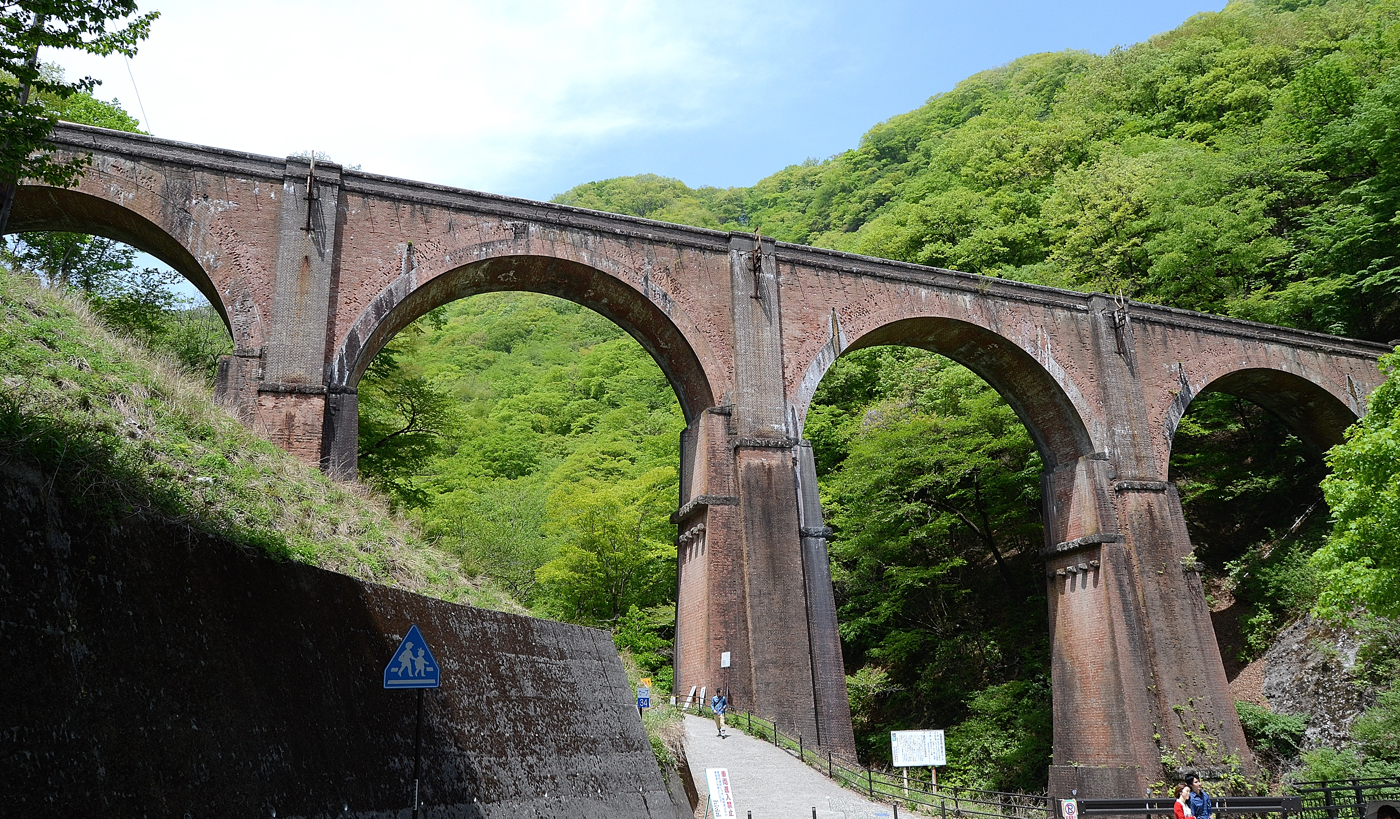 群馬県安中市にある、旧信越本線の碓氷第3橋梁。